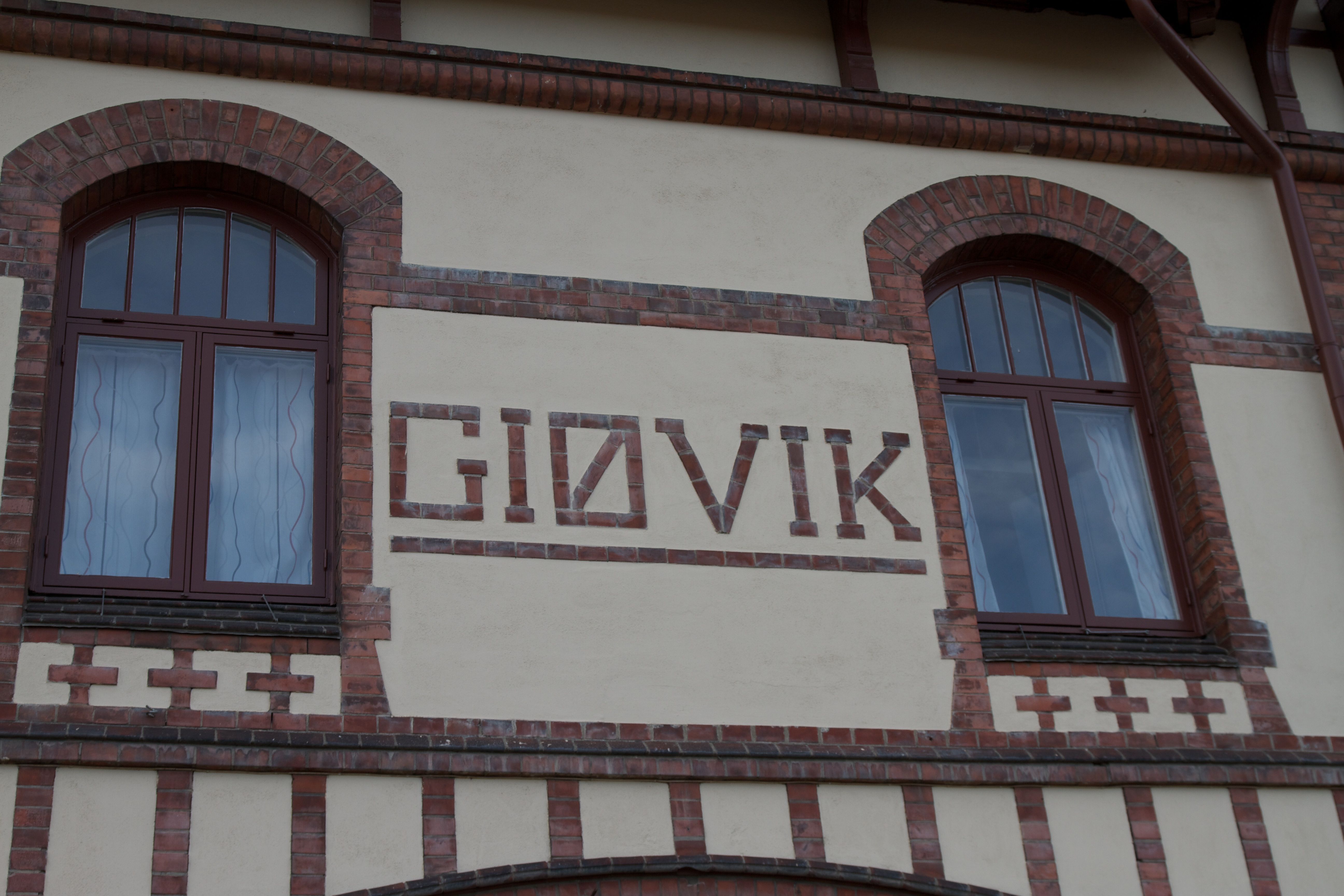 Gjøvik stasjon.